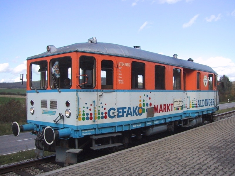 VT 04 am Bahnsteig Vaihingen/Enz WEG